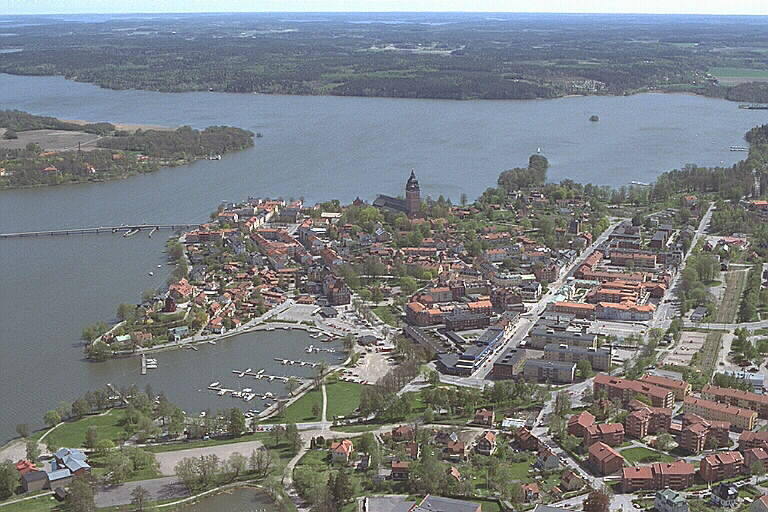 Strängnäs domkyrka mitt i bilden. Motiv: Strängnäs Nyckelord: Flygbilder, Riksintressen Kategori: StadsmiljöSträngnäs domkyrka mitt i bilden.